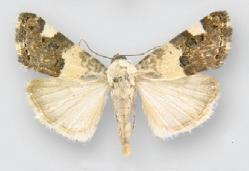 Acontia toddi male